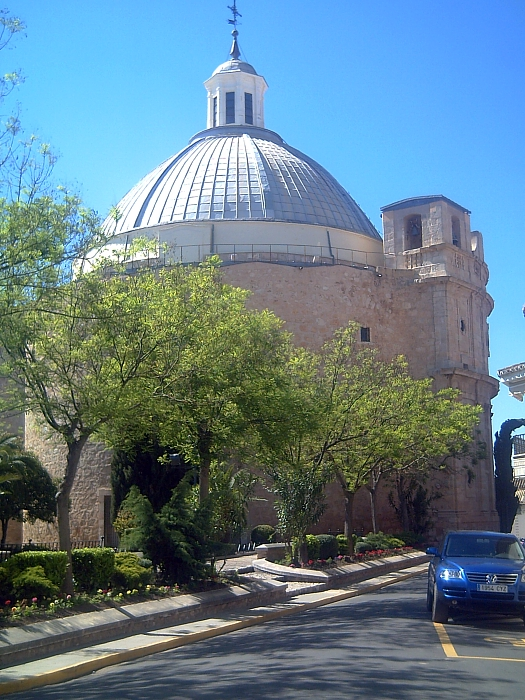 Miguelturra El Cristo Church